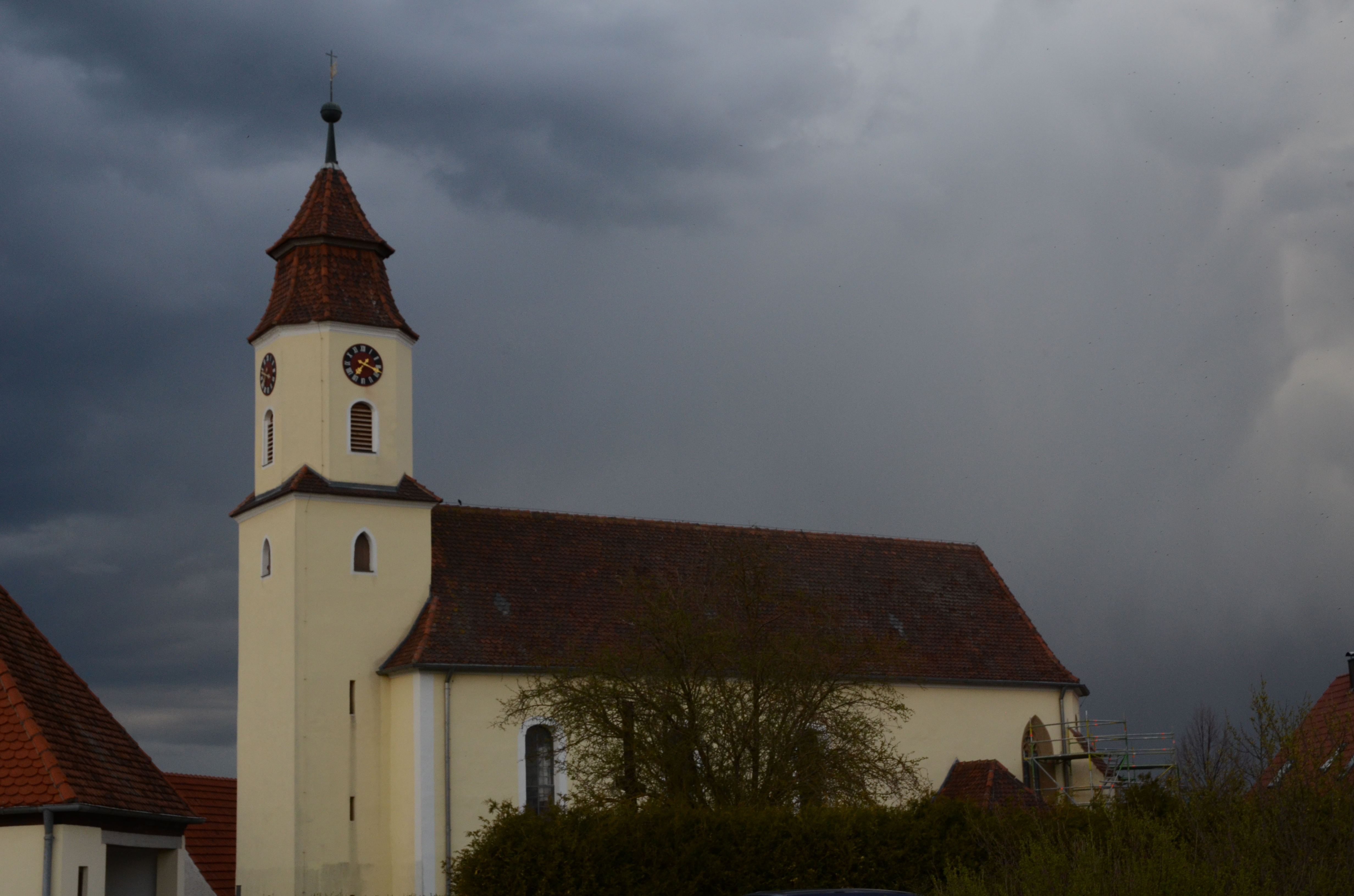 evang.-luth. Kirche St. Jodokus in Enkingen